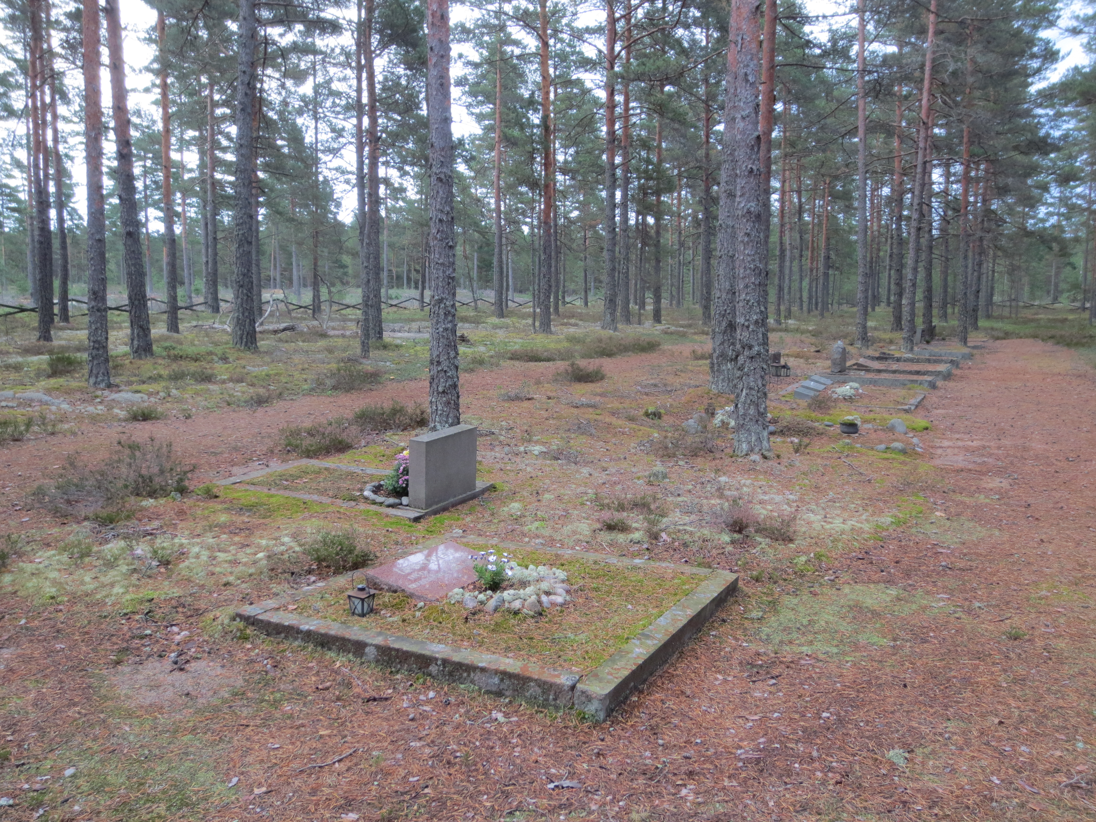 Santalan hautausmaa Santalassa Hangossa